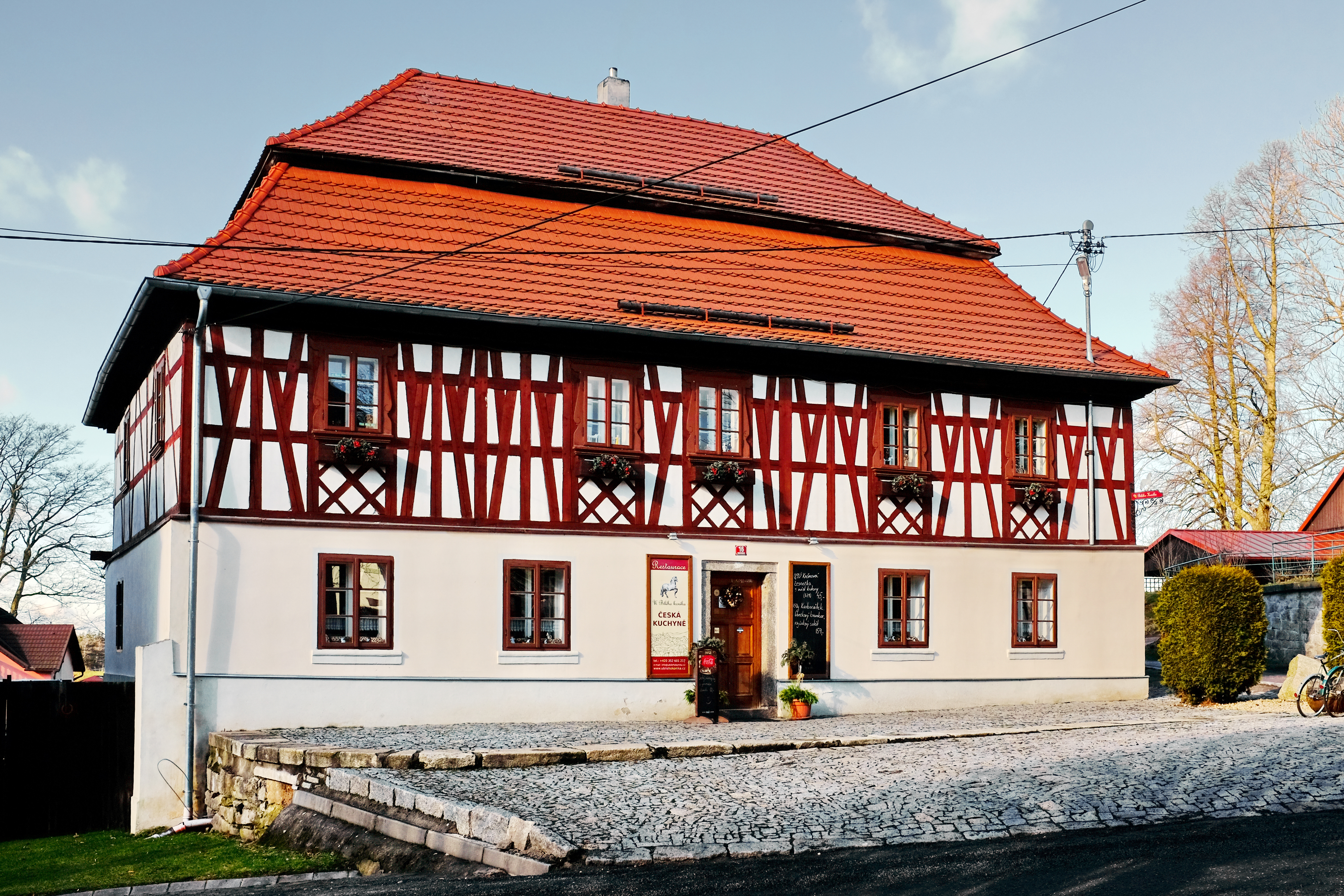 Kostelní Bříza, Zartnerův hostinec čp. 16, okres Sokolov